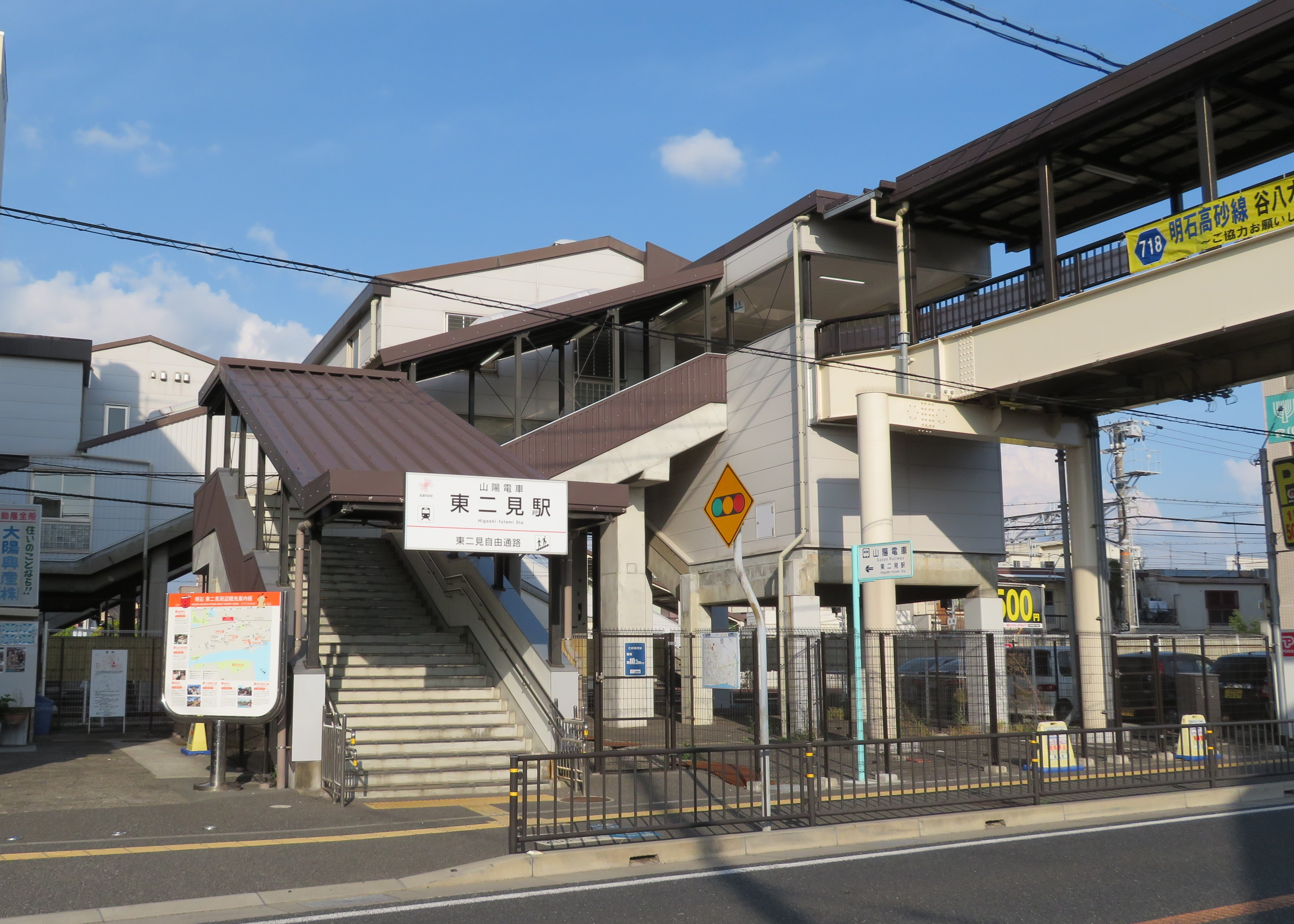 山陽電鉄東二見駅